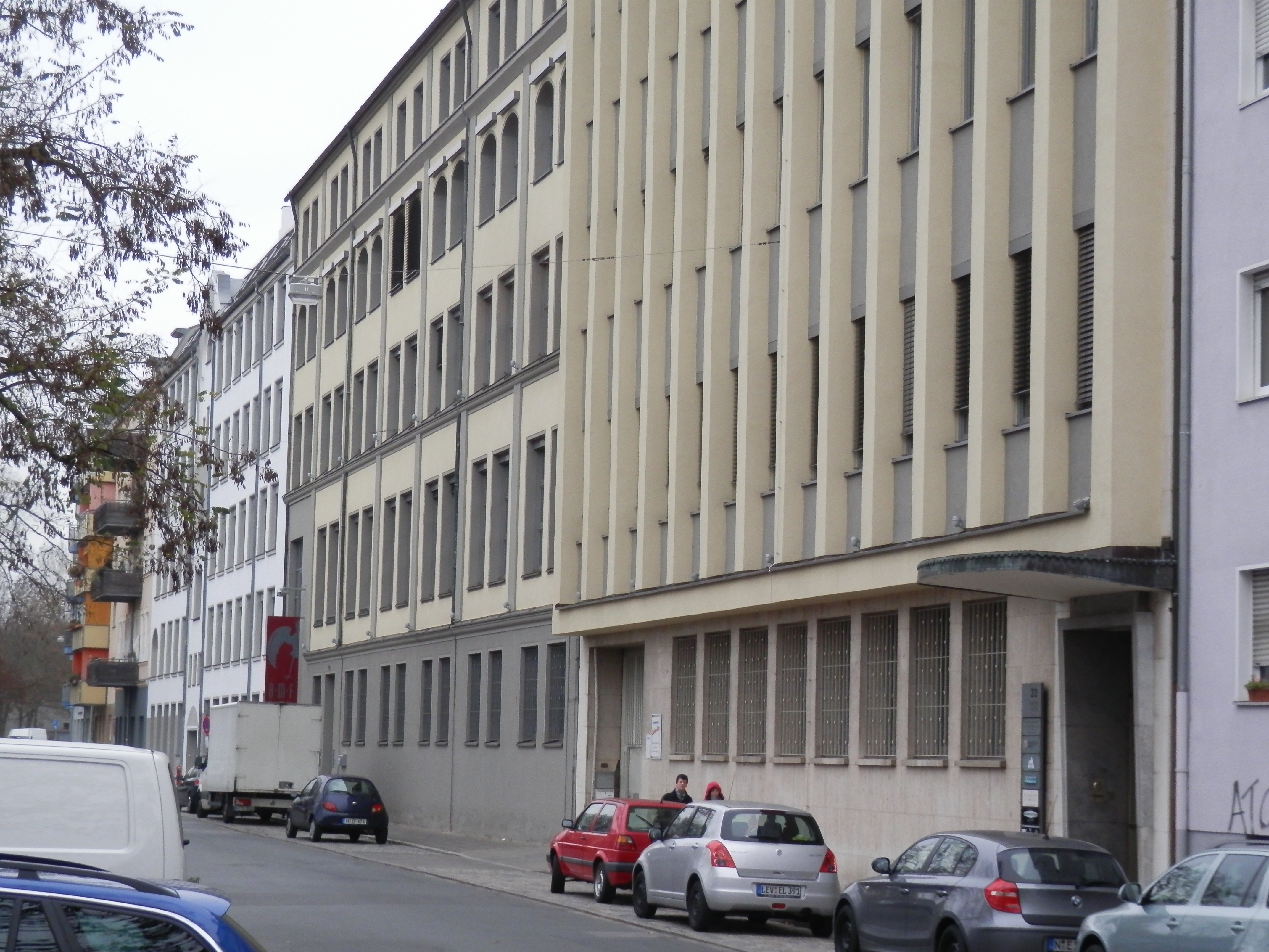 Ehemalige Bayerische Metallwarenfabrik in der Wiesentalstraße, Nürnberg